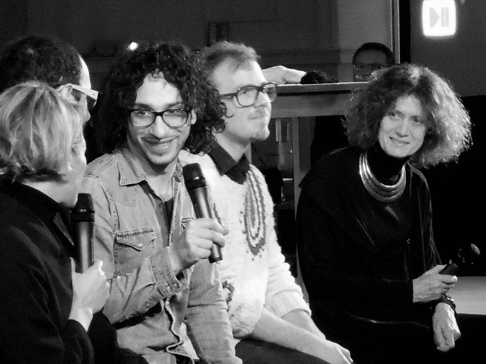 Noëlle Châtelet et Vahram Zaryan / Forum Européen de Bioéthique - Forum Culture / Strasbourg